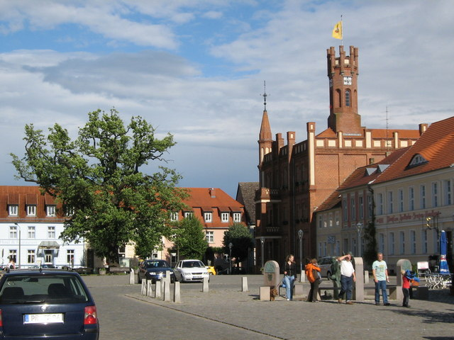 Kyritz - Stadtmitte